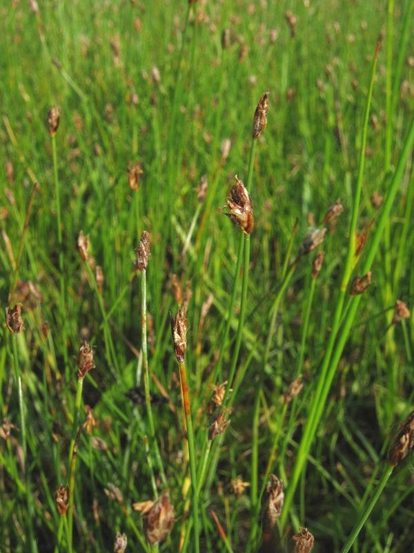 Wenigblütige Sumpfsimse Eleocharis quinqueflora, Müritz-Gebiet